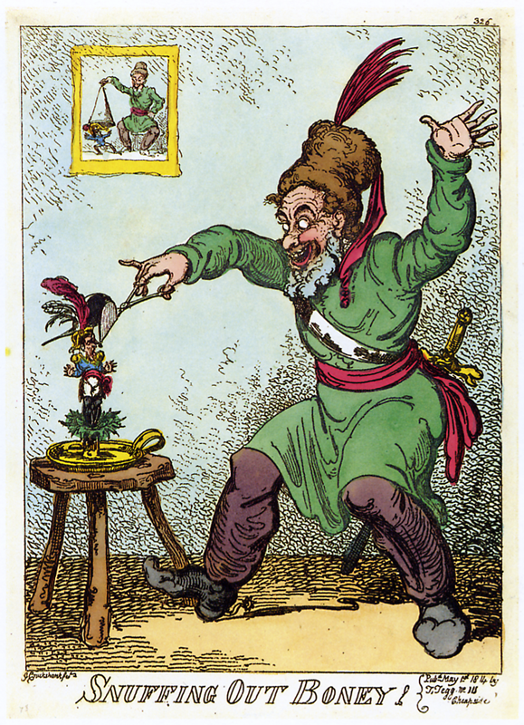 Boney wird ausgelöscht! – Ein Kosak (als Inbegriff für Rußland) macht Napoleon (in Gestalt einer Kerze) 1814 den Garaus. An der Wand hängt ein Bild, auf dem ein Kosak Napoleon mit Napoleon als Marionette spielt.